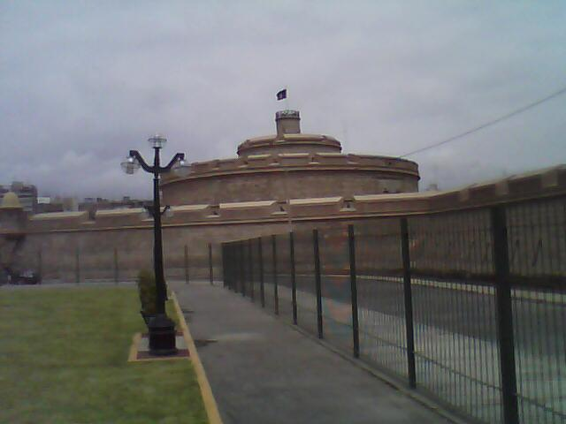 Template:Viendo la casa de bruno.